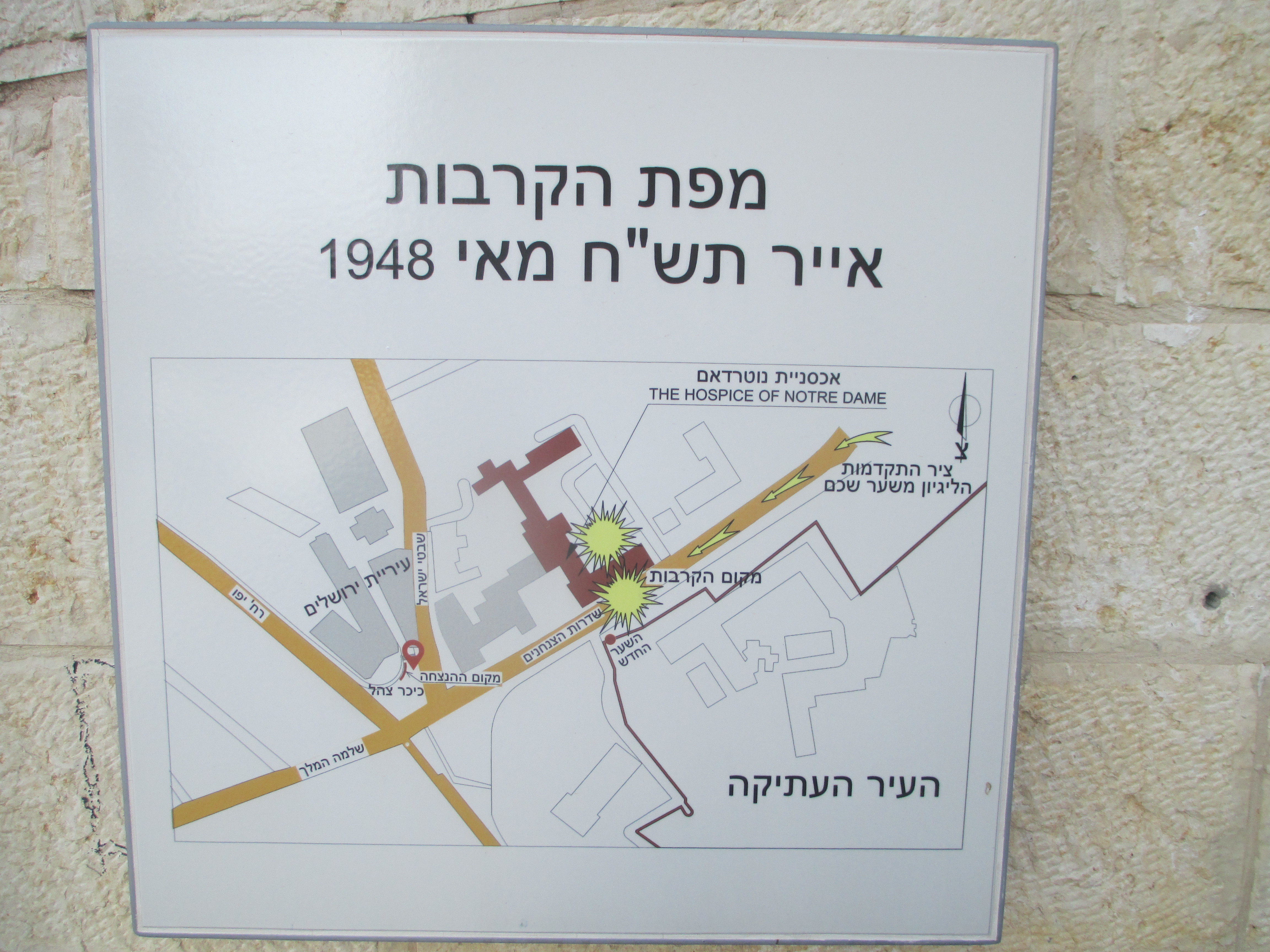 אתר זיכרון לקרב נוטרדאם בכיכר צה"ל בירושלים